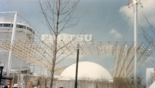 科学万博